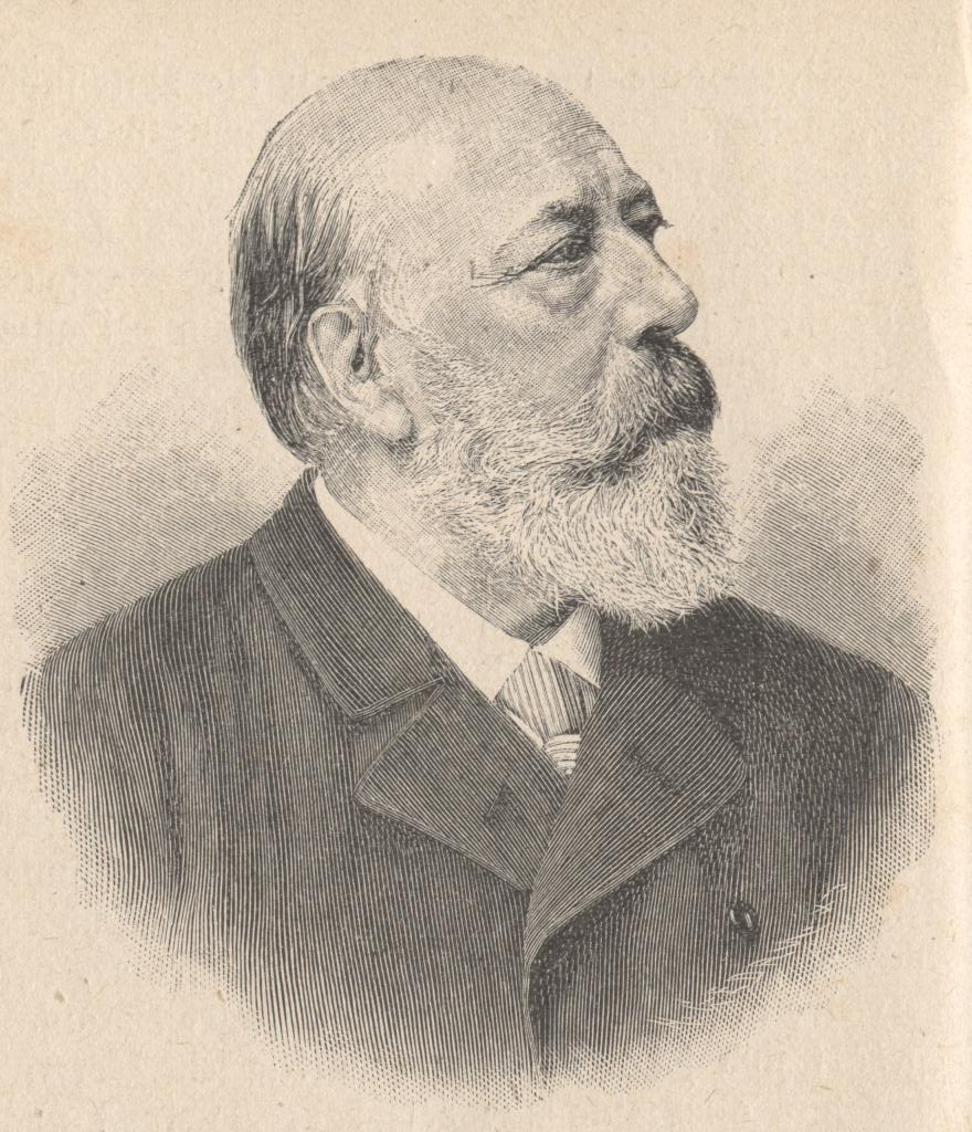 Stich